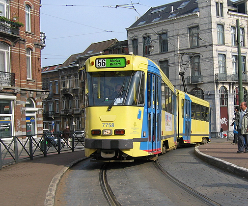 Een tram van de Brusselse tramlijn 56.